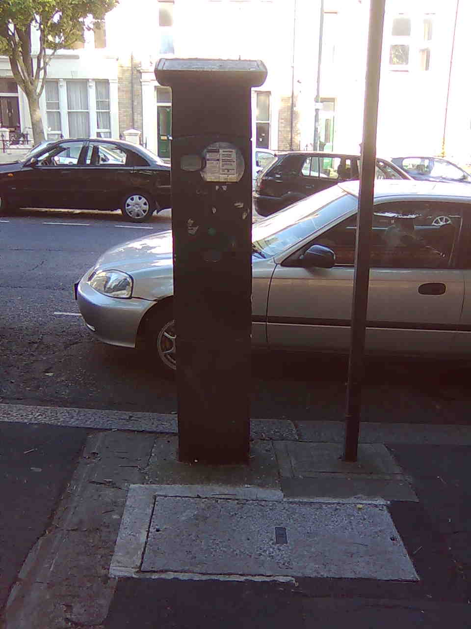 Автомат для оплаты парковки